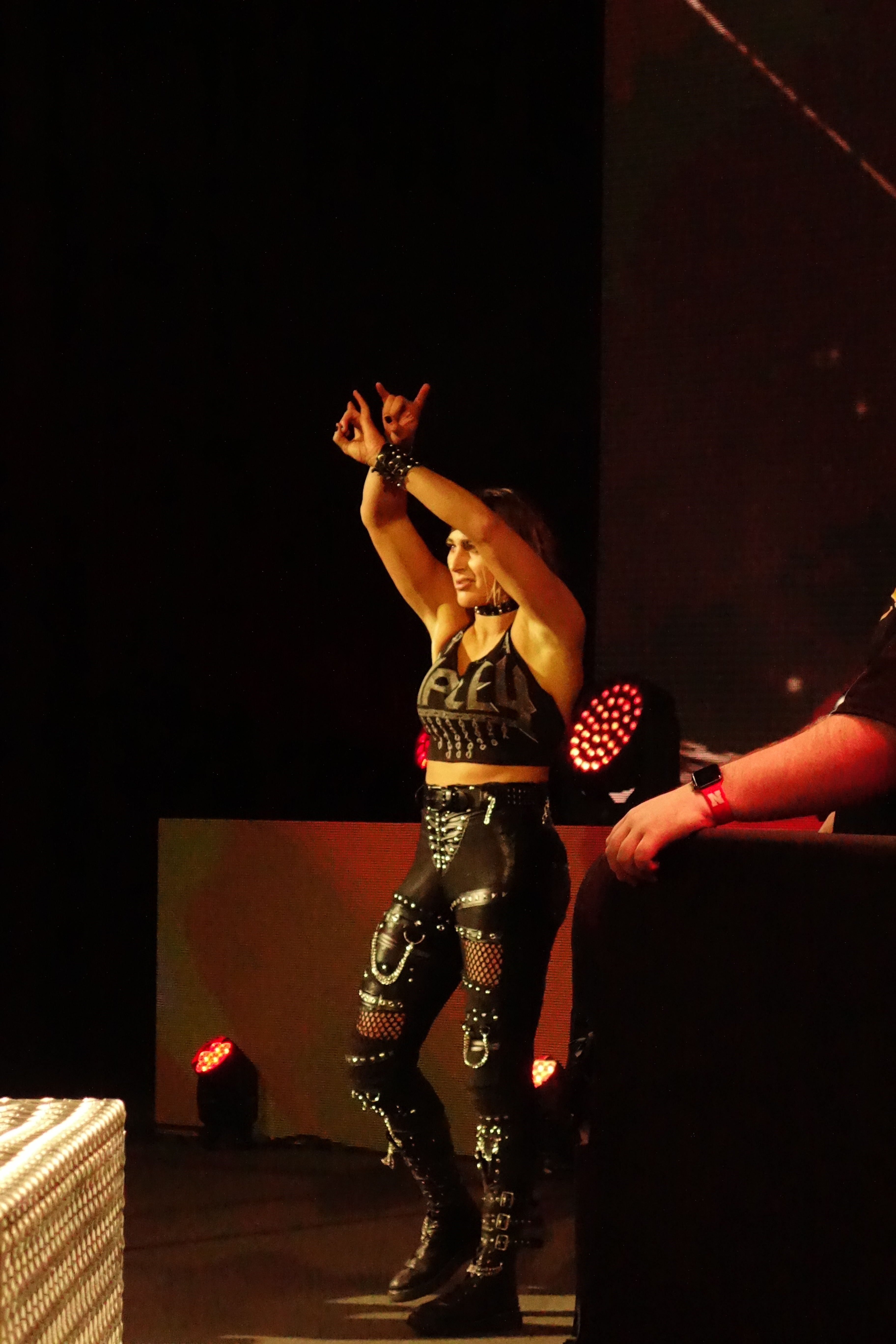 Rhea Ripley fait un signe au public après un combat de catch.